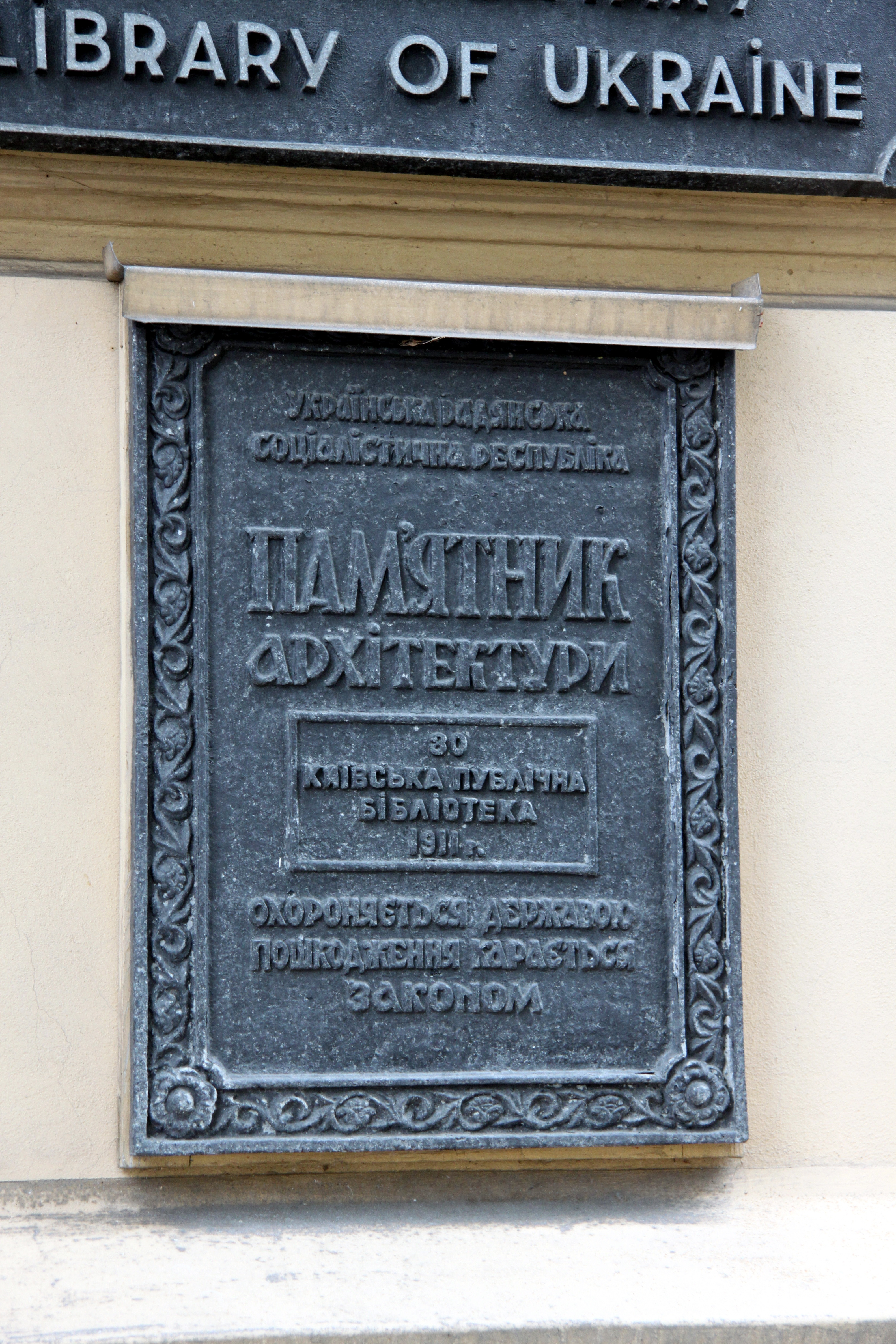 Бібліотека міська публічна (Парламентська), Київ, Грушевського Михайла вул., 1